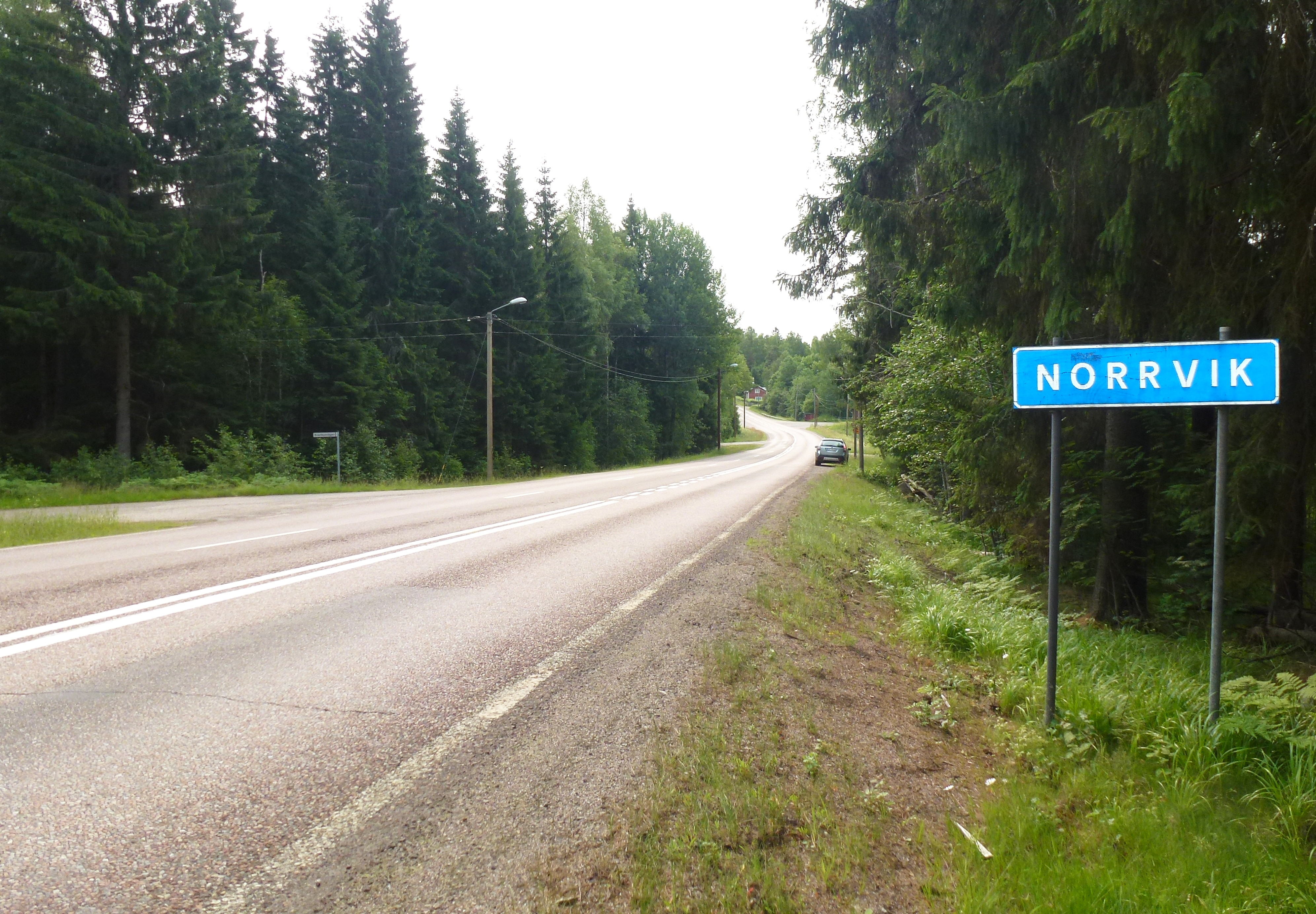 Ortsinfart norrifrån till Norrvik